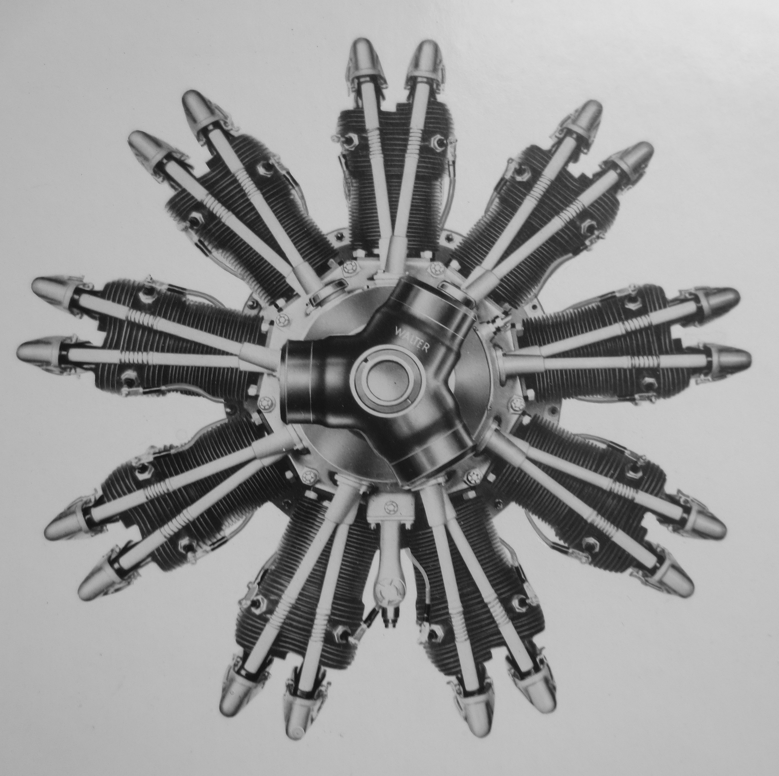 letecký motor Walter Bora (1934)